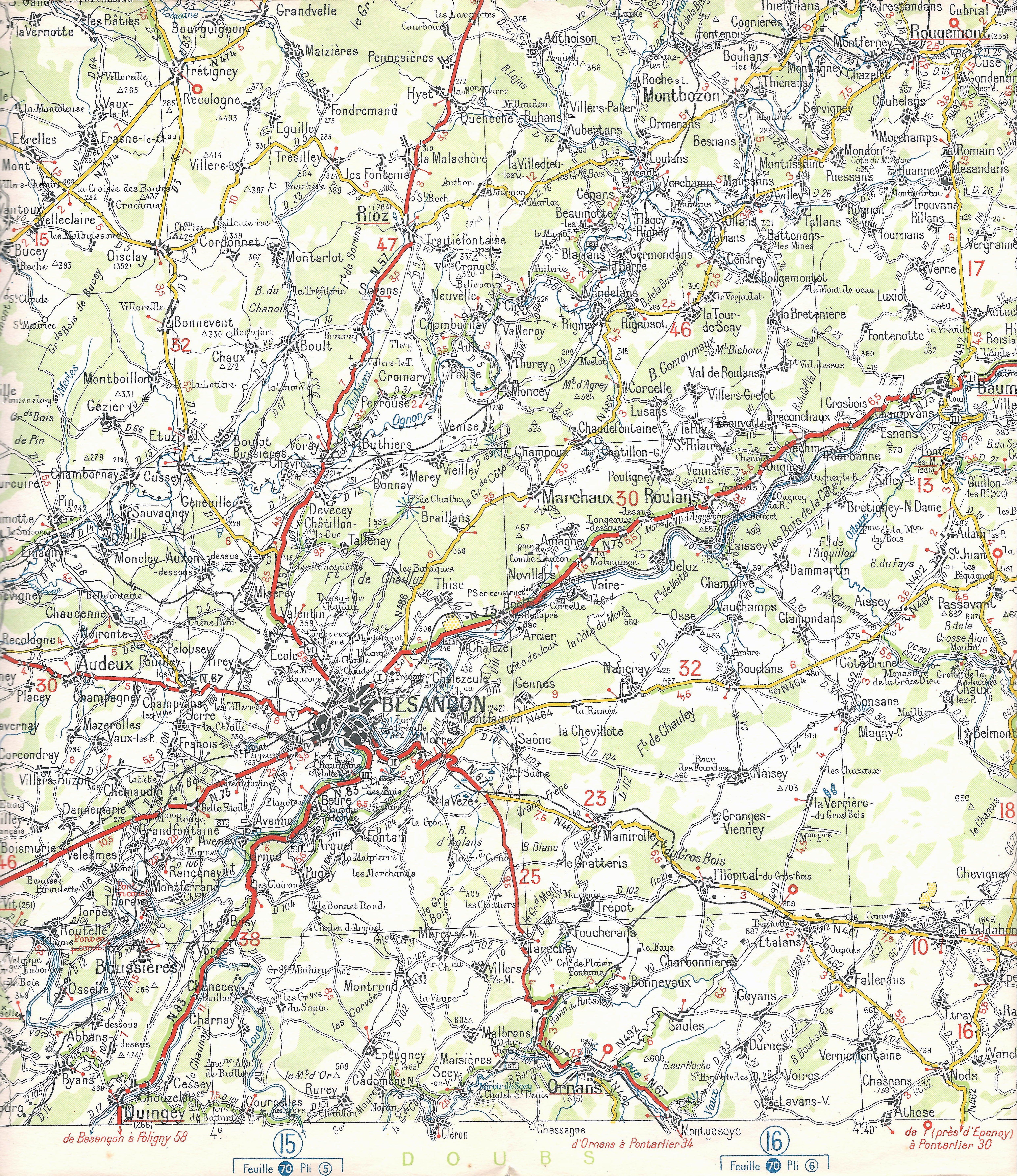 Deel (Besancon) van Michelin kaart nr 66 Frankrijk) uitgegeven in 1940. Dit moet voor de Duitse inval van 10 mei 1940 verkocht zijn.